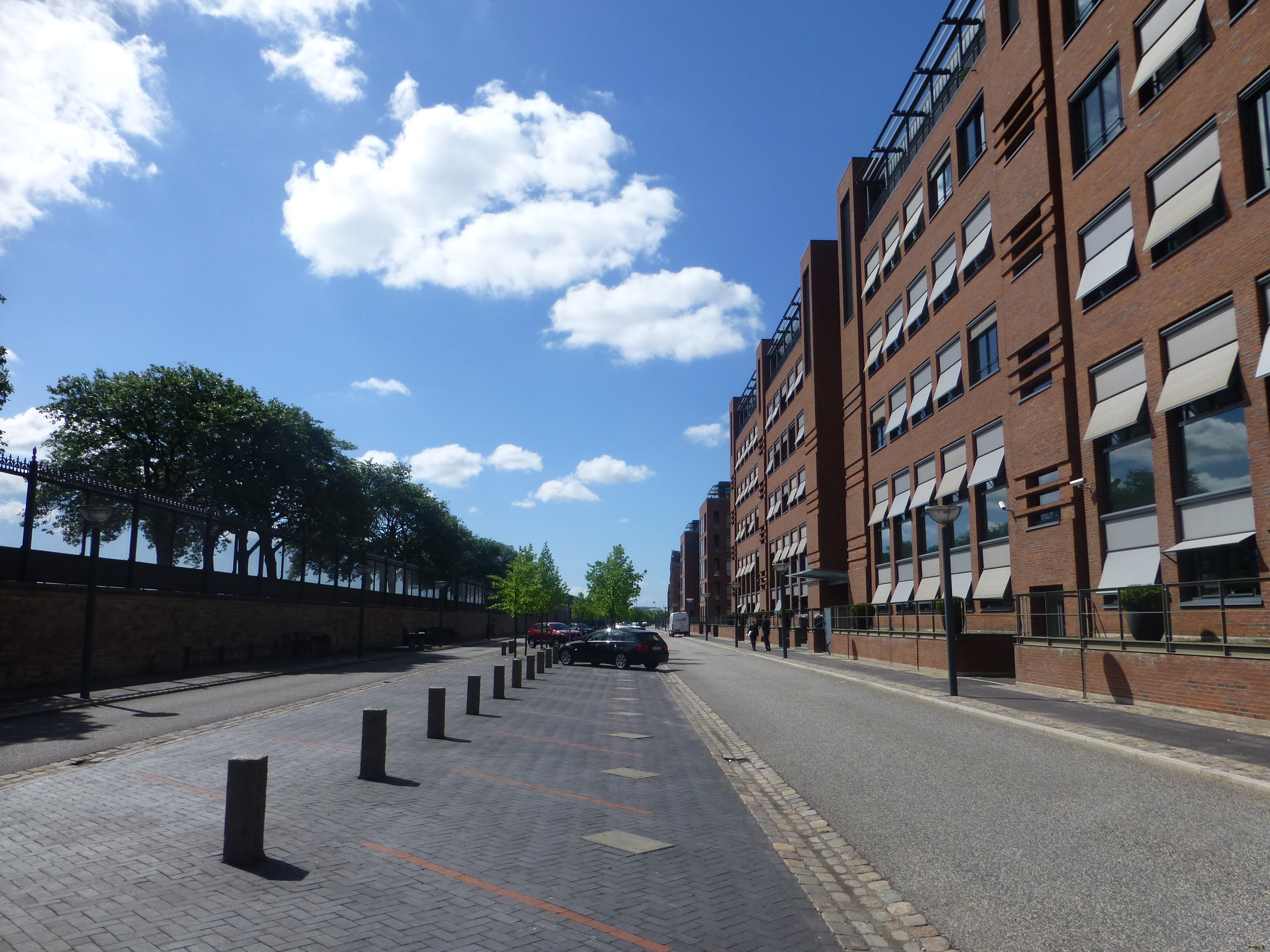 The street Langelinie Alle in Østerbro in Copenhagen.